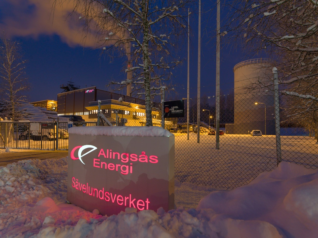 Sävelundsverket en kall vinterdag